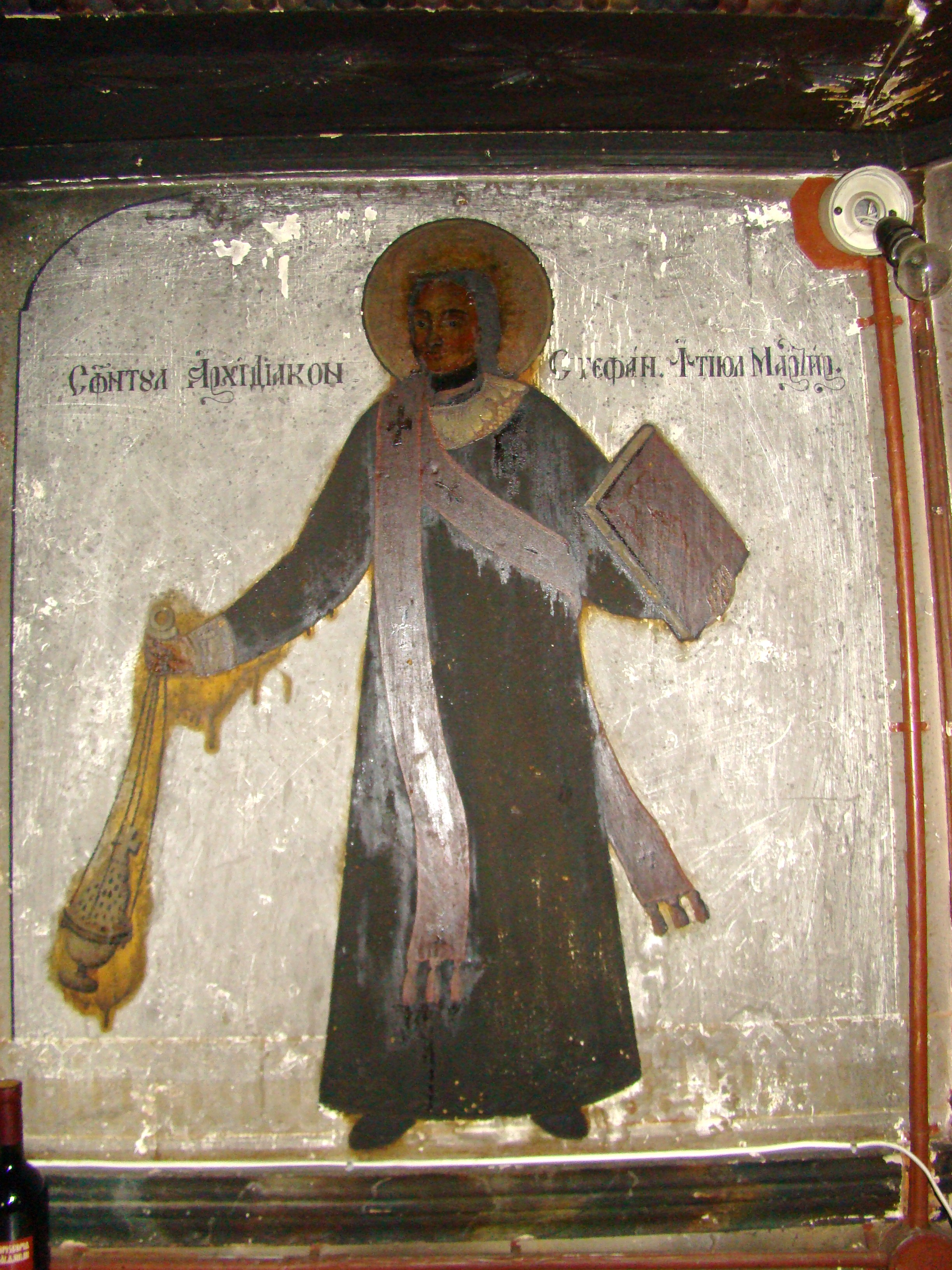 Biserica „Sf. Arhangheli Mihail și Gavriil” din Răstoci, județul Sălaj